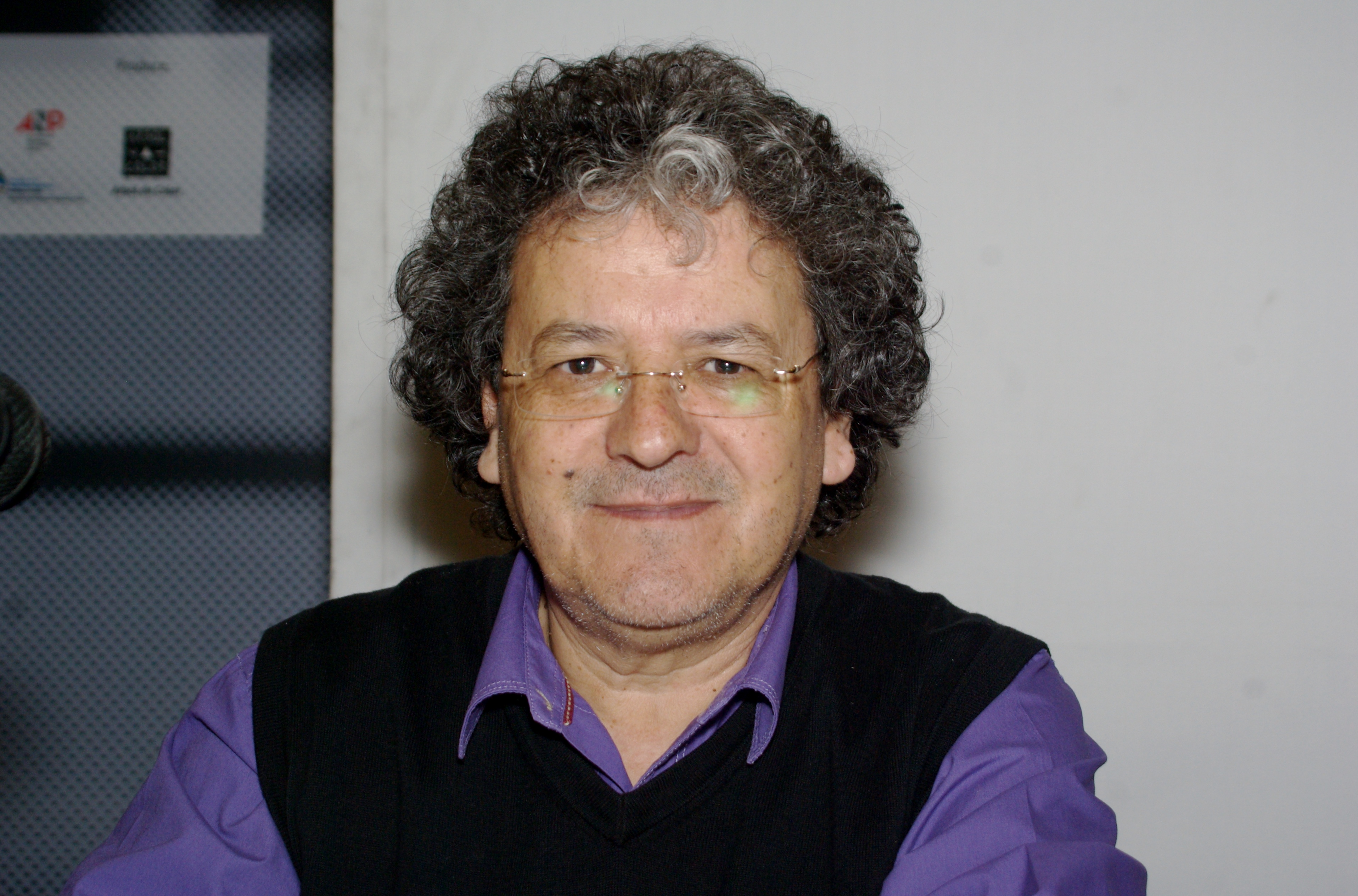 El historiador chileno Mario Garcés en la Feria Internacional del Libro de Santiago 2015